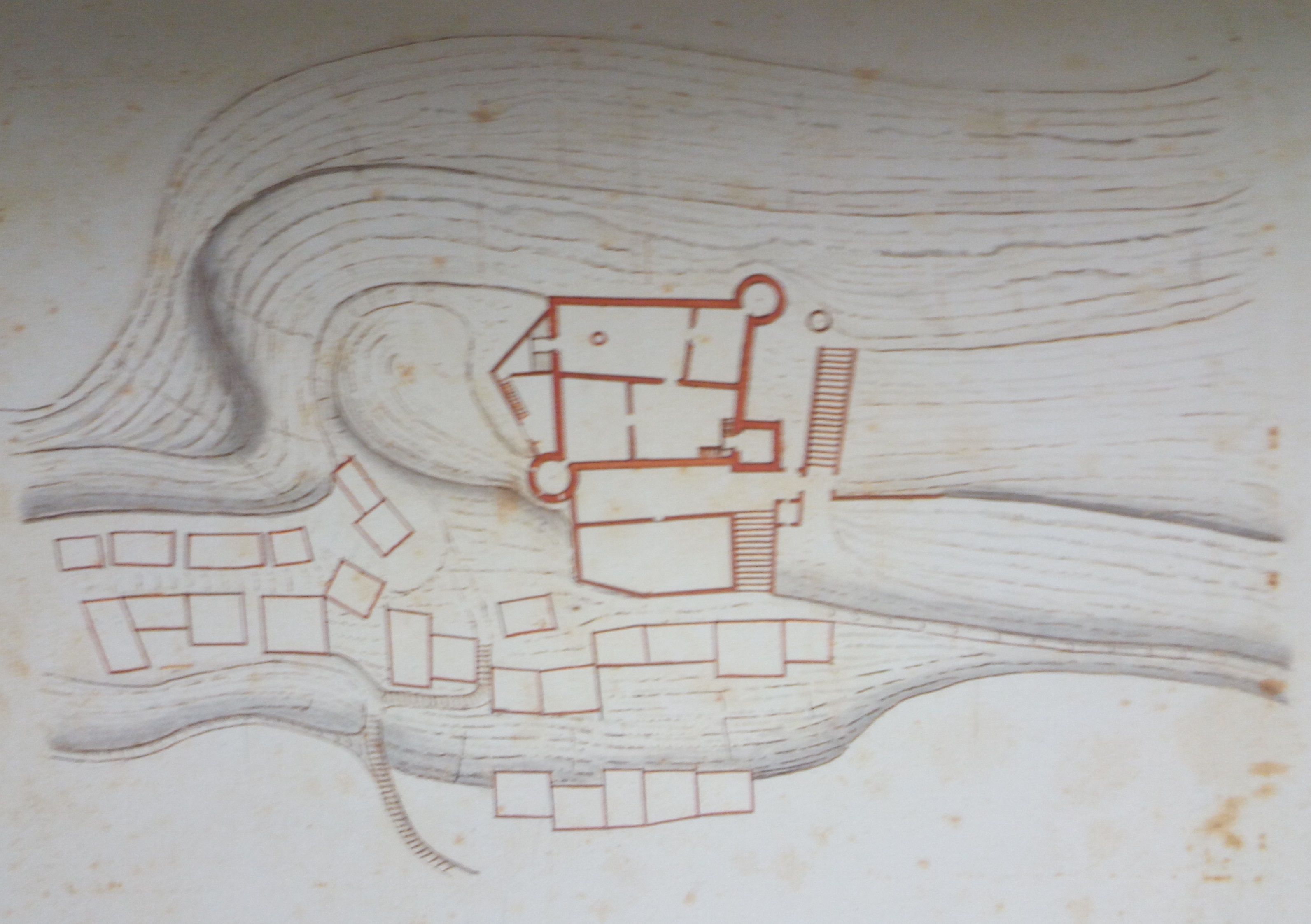 Plan du Chateau de Thiéry en 1650par Carlo Morello